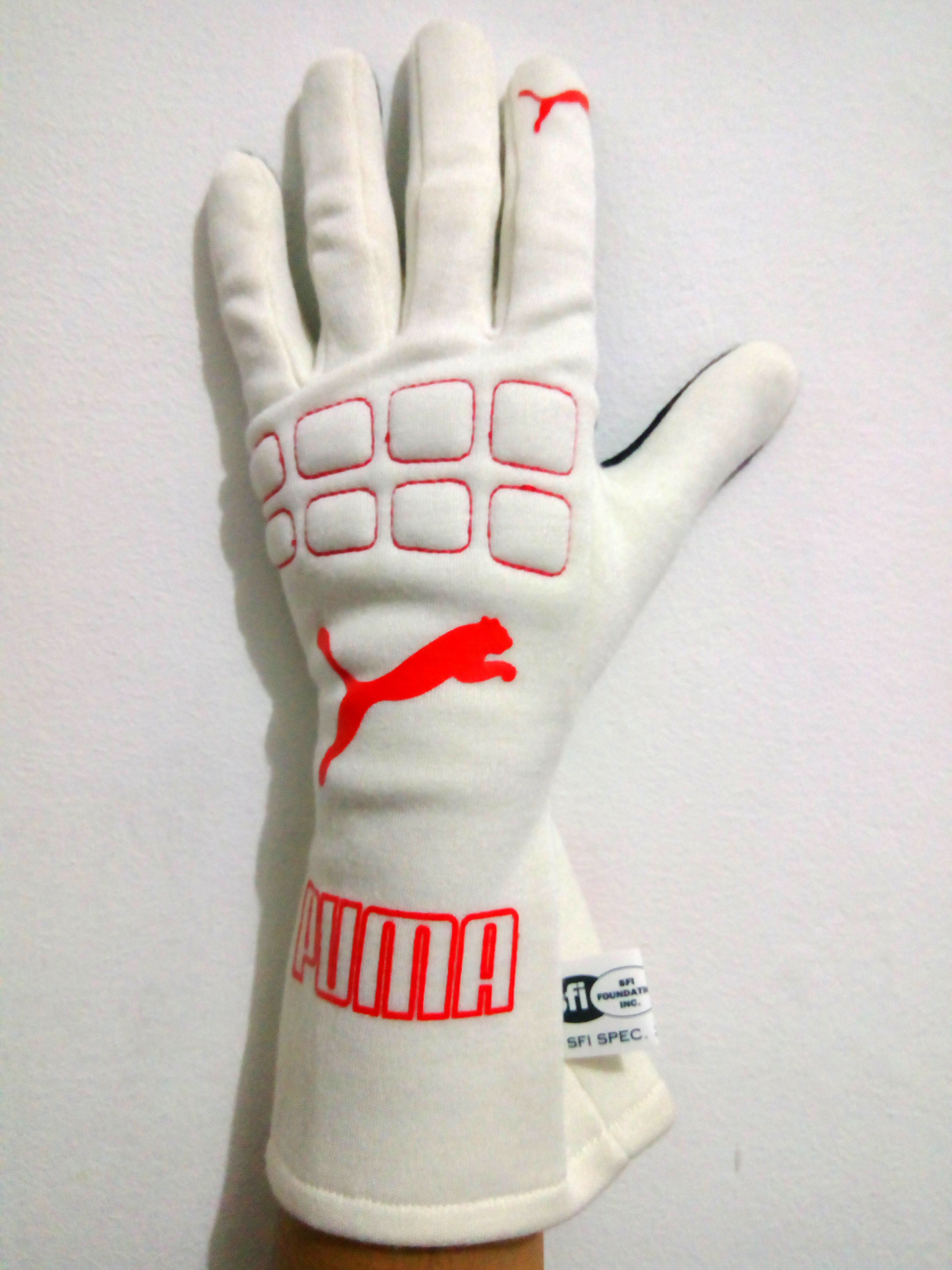 Sarung tangan anti api Puma Furio warna putih